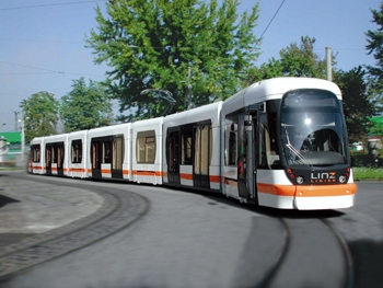 Der erste Cityrunner in Linz (Original text: Der erste Cityrunner in Linz)